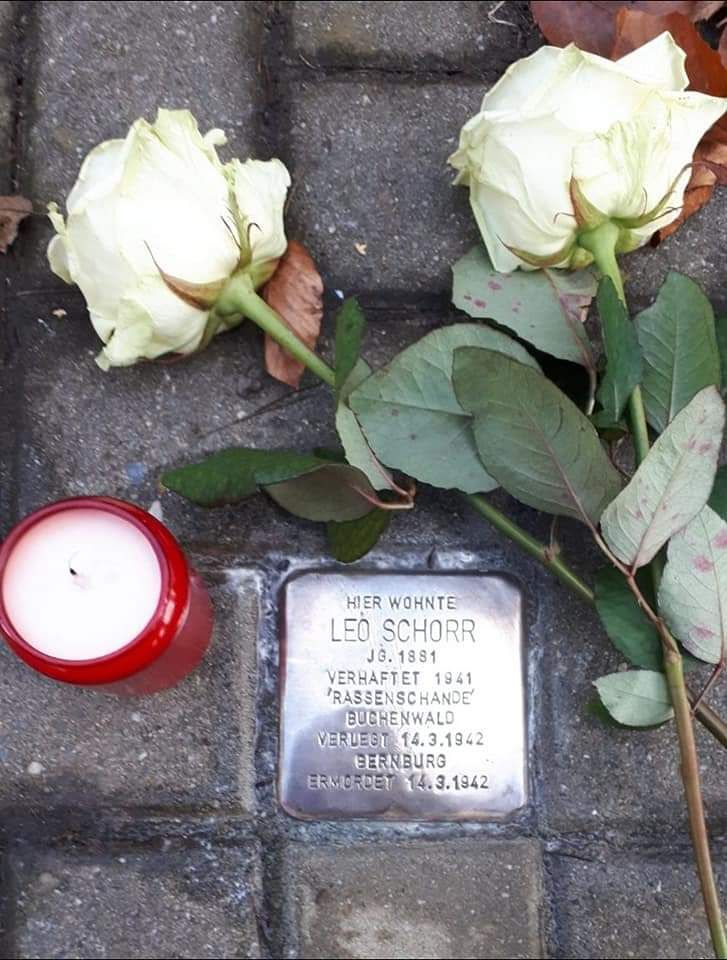 Stolperstein im Gedenken an Leo Schorr in der Diezstraße in Pößneck